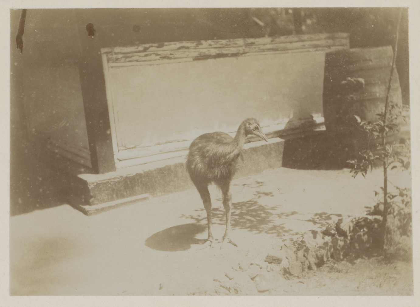 Academische Collecties: 1899-1900, Siboga-expeditie naar Nederlands Oost-Indië, onder leiding van Max Wilhelm Carl Weber